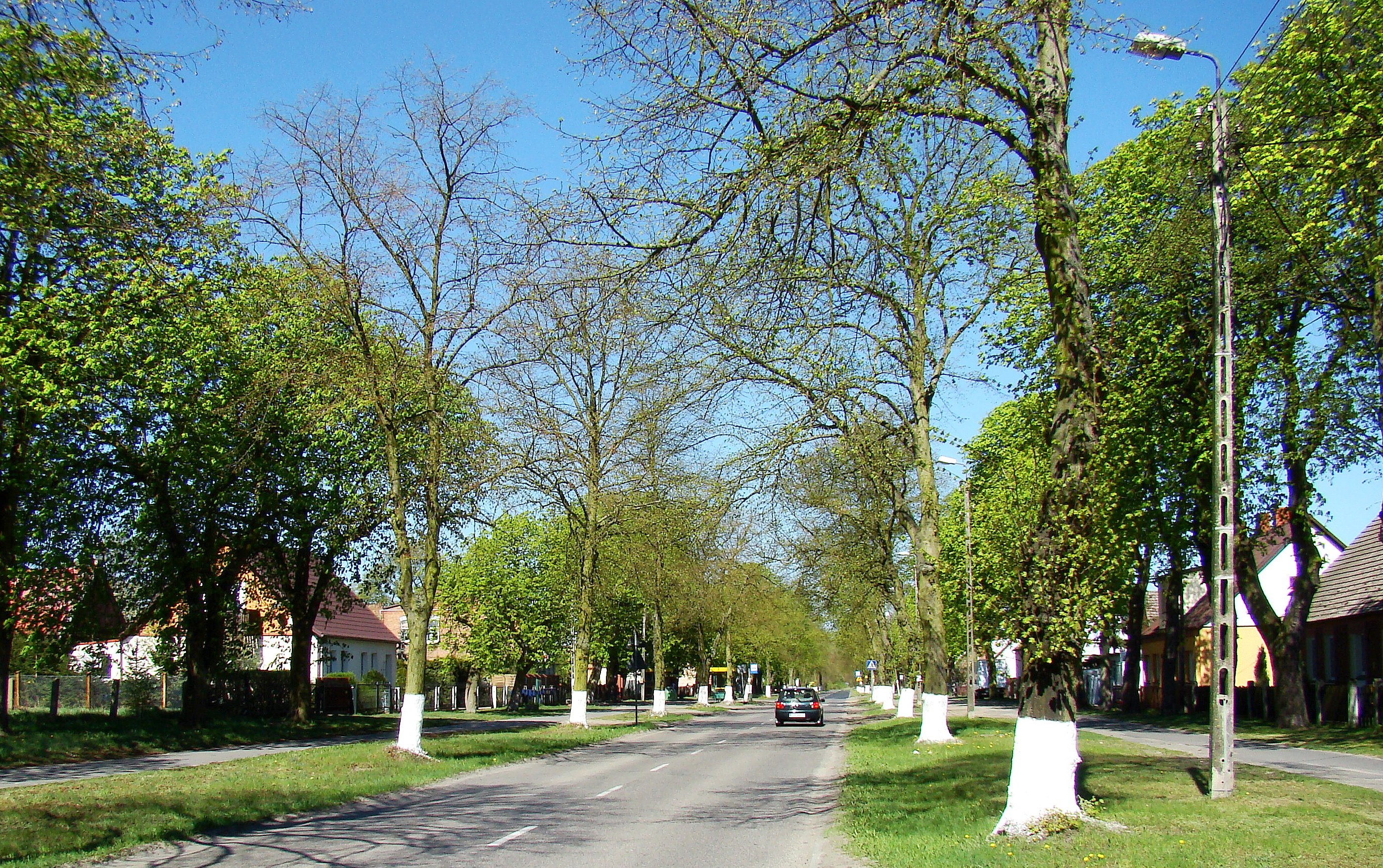 Niekłończyca, (Gmina Police, Województwo zachodniopomorskie), Polska